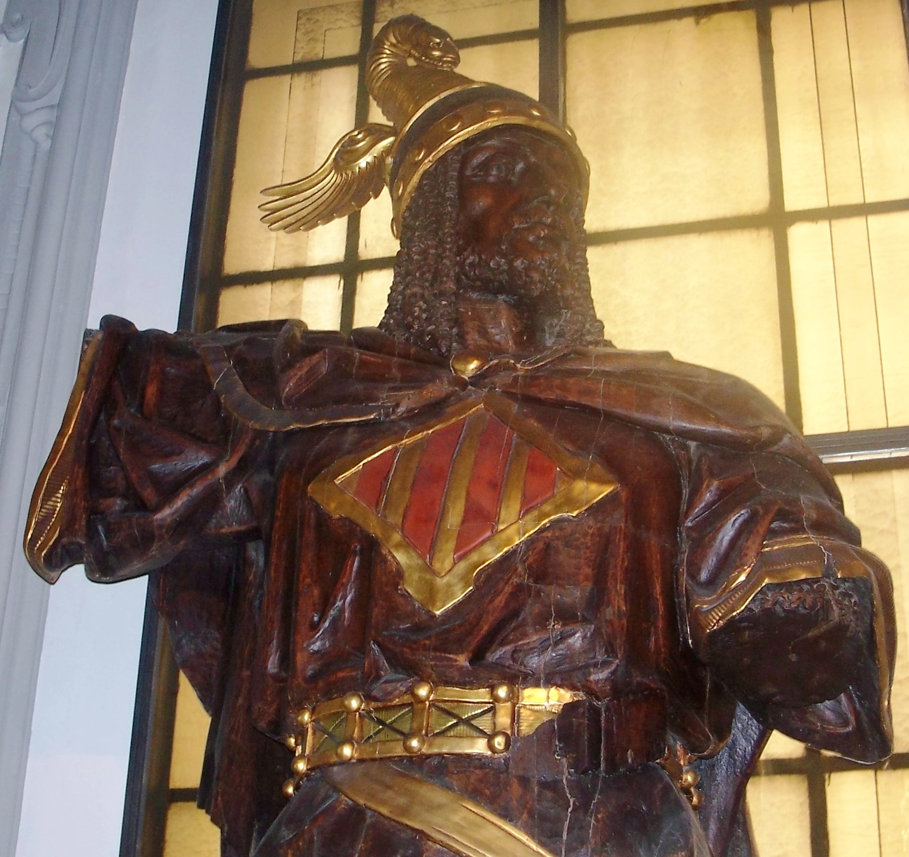 Rei_En_Jaume_I_a_l'arxiu_Municipal_de_la_ciutat_de_València_(s._XIX)